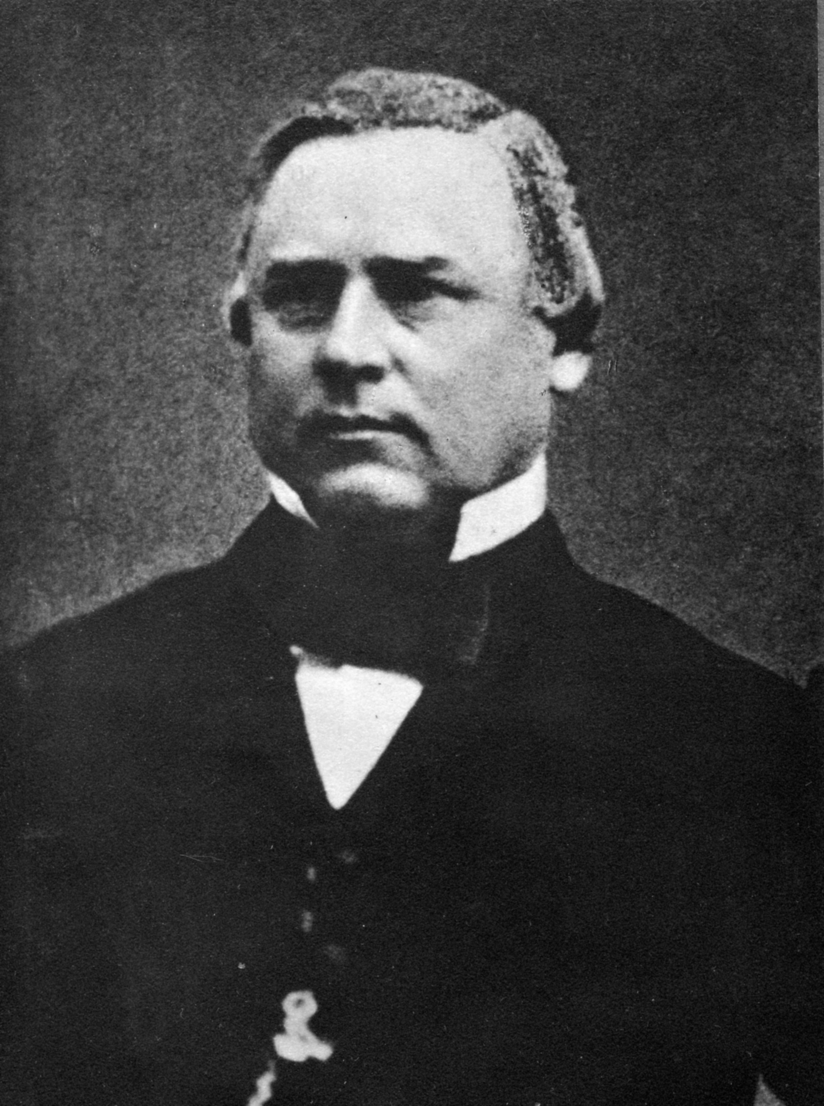 Överste Axel Göthrik Adalrik Ljungstedt, sekundchef för Flottans Konstruktionskår. Bild av okänd fotograf från ca 1860.